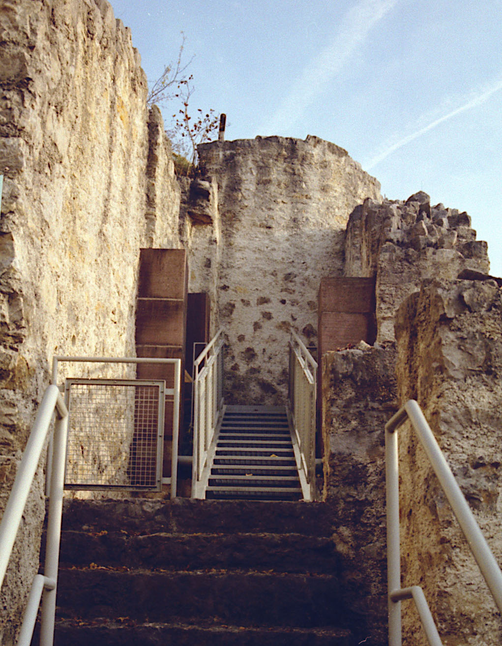 Zwinger als Aufgang zur Kernburg des Schlosses Münchenstein